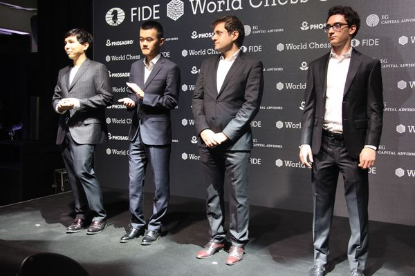 Турнир Претендентов 2018, Церемония открытия